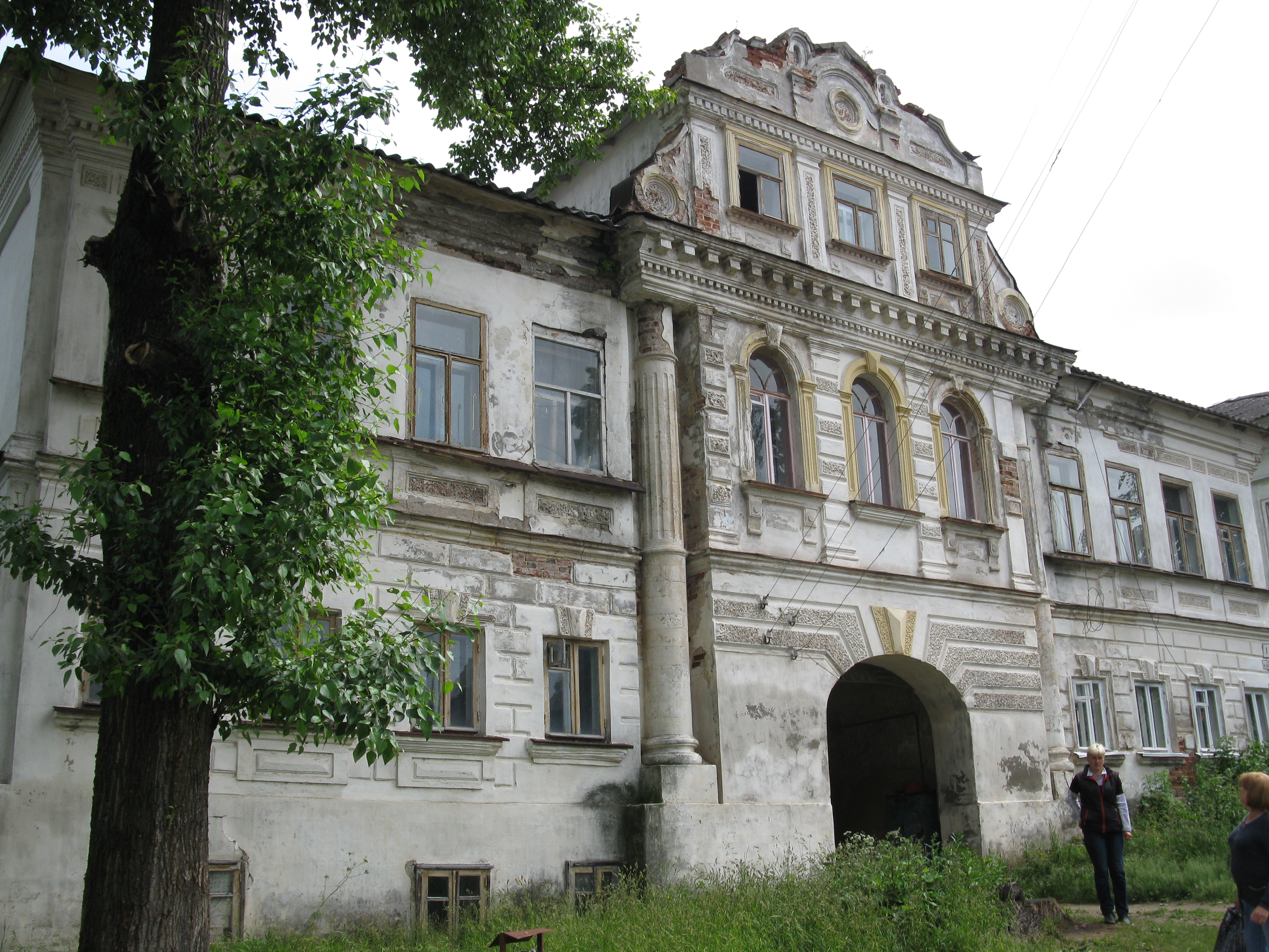 Бывший дом купцов Рыжковых